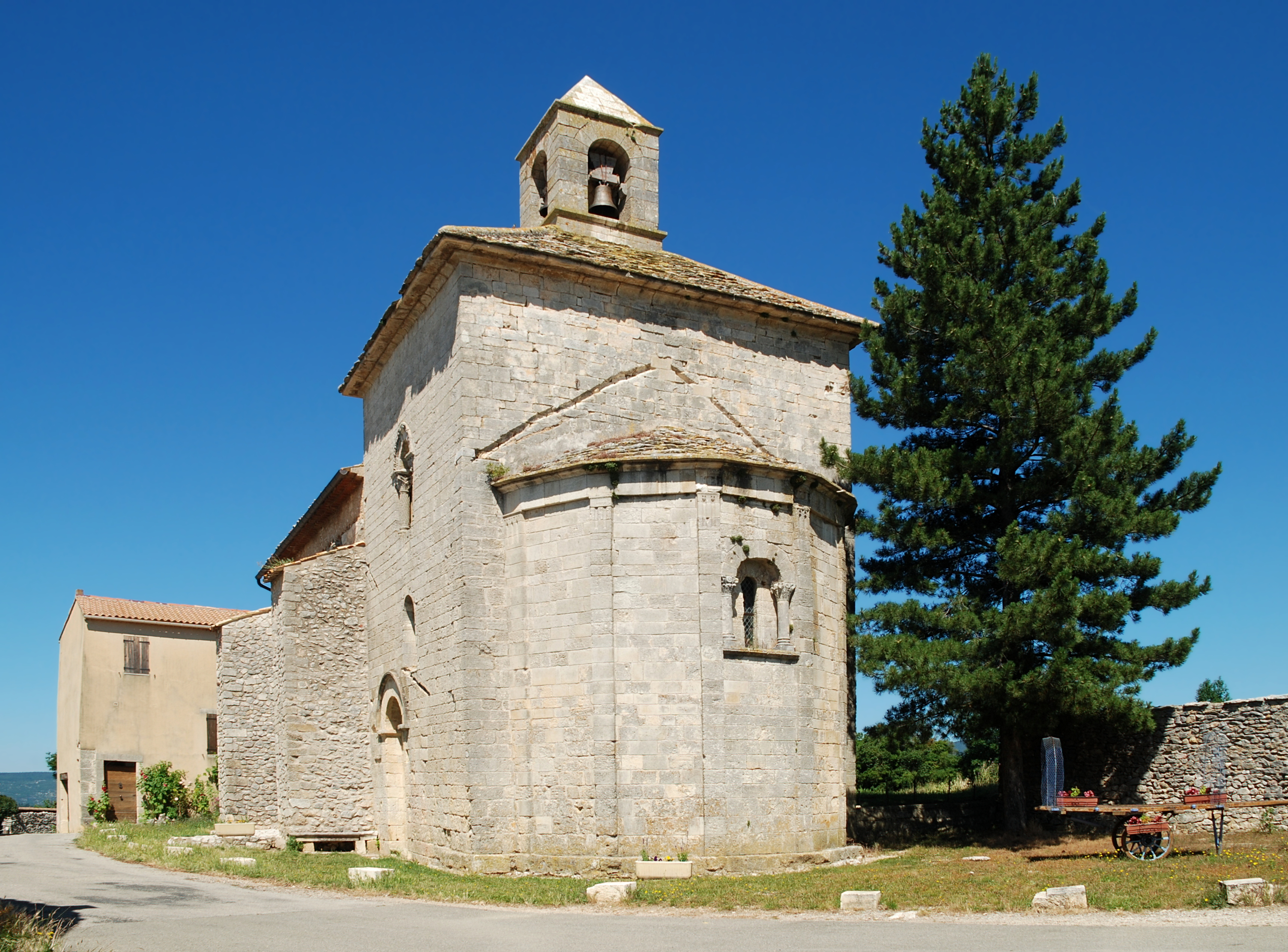 France - Provence - Église de Saint-Trinit